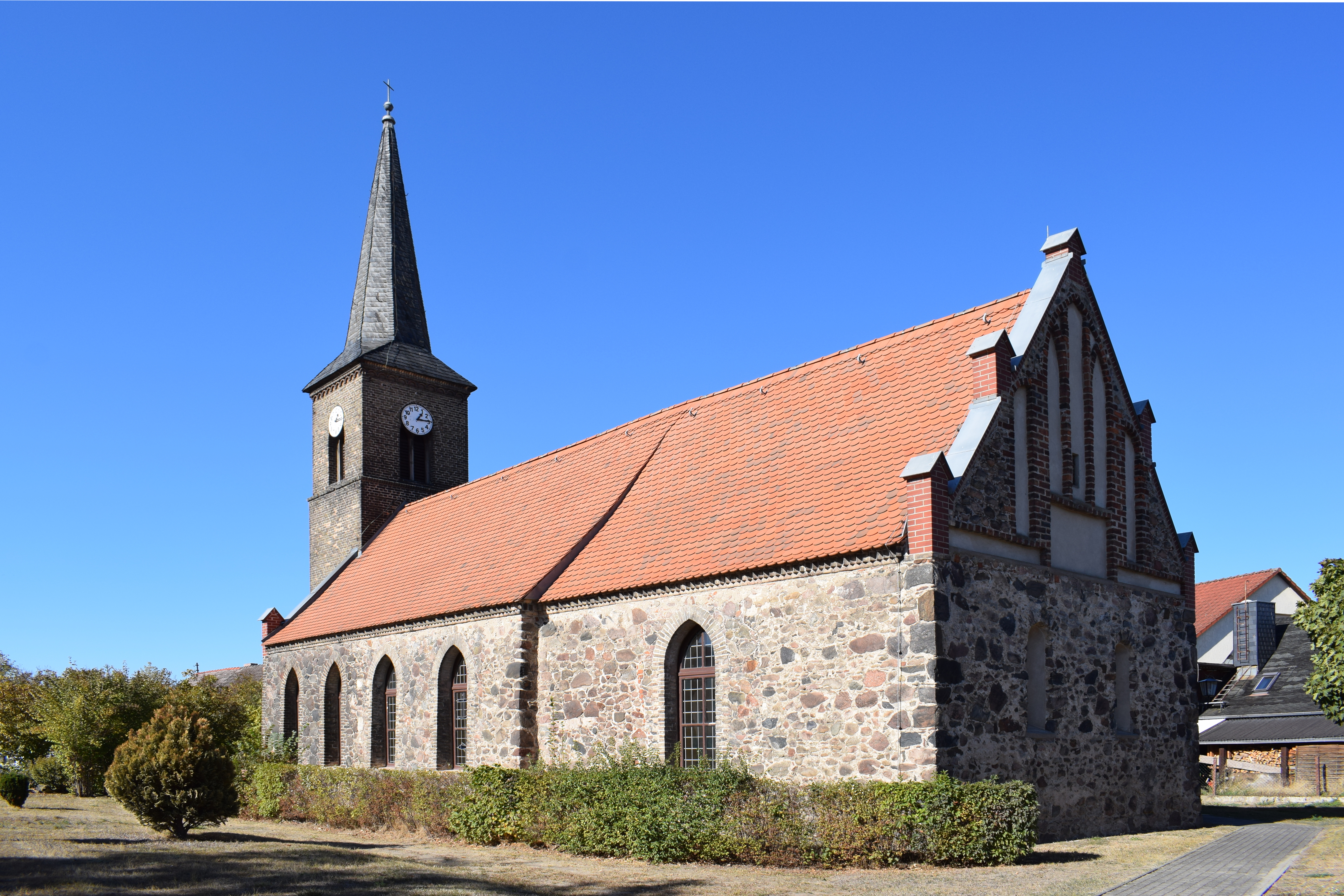 Dorfkirche in Hennickendorf, einem Ortsteil von Rüdersdorf, Brandenburg.